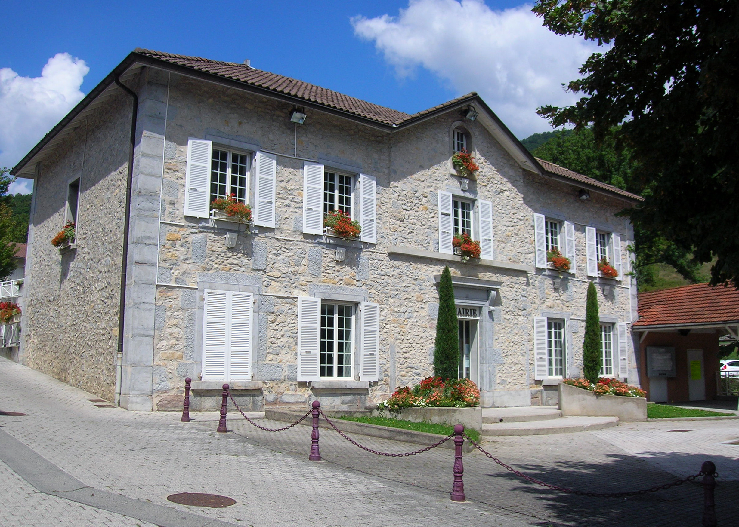 Fontanil-Cornillon, Isère, AuRA, France.